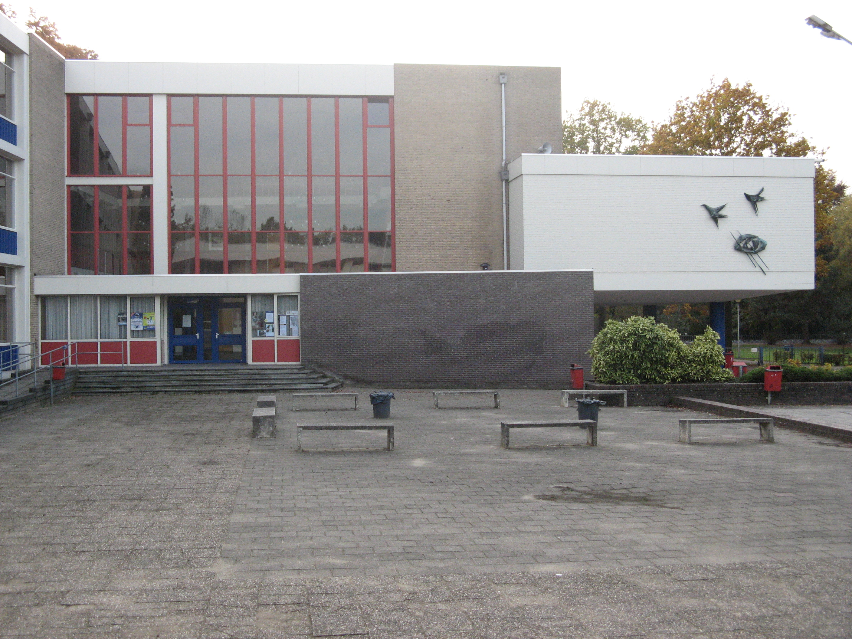 Zicht op de hoofdingang en de centrale hal van Lyceum Schöndeln.